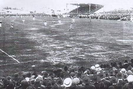 Foto del estadio Pocitos en 1930 (estadio desaparecido)